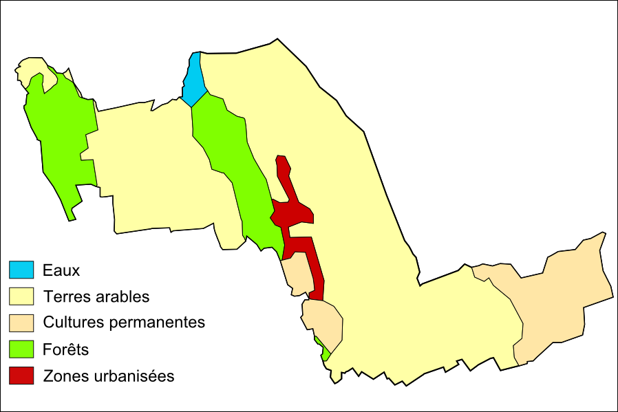 Carte d'occupation des sols de la commune de Labatut-Rivière, Hautes-Pyrénées, France